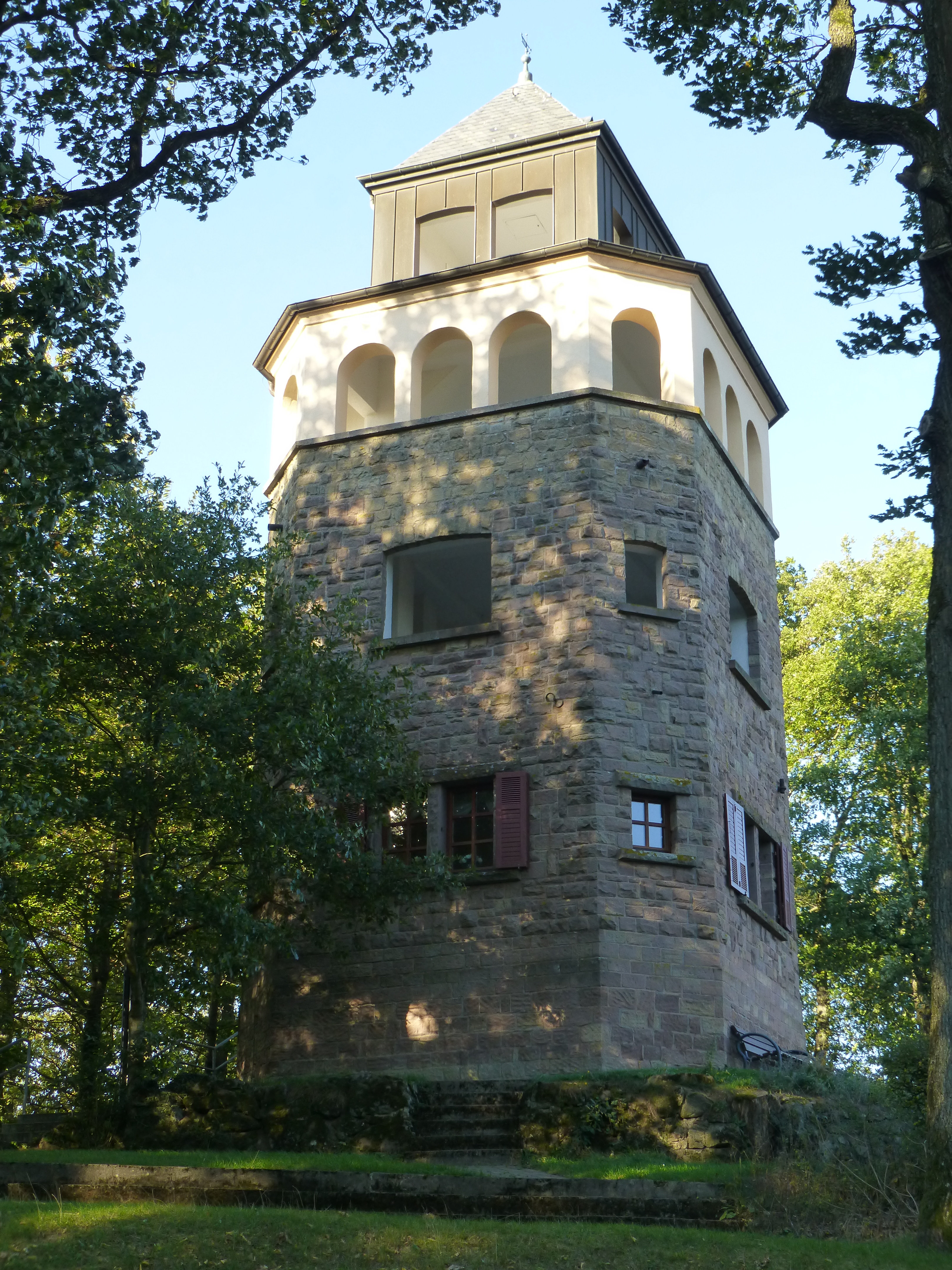 Der Eulenkopfturm bei Eulenbis